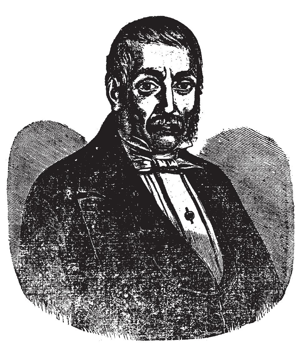 Griechischer Gelehrter, 19. Jahrhundert